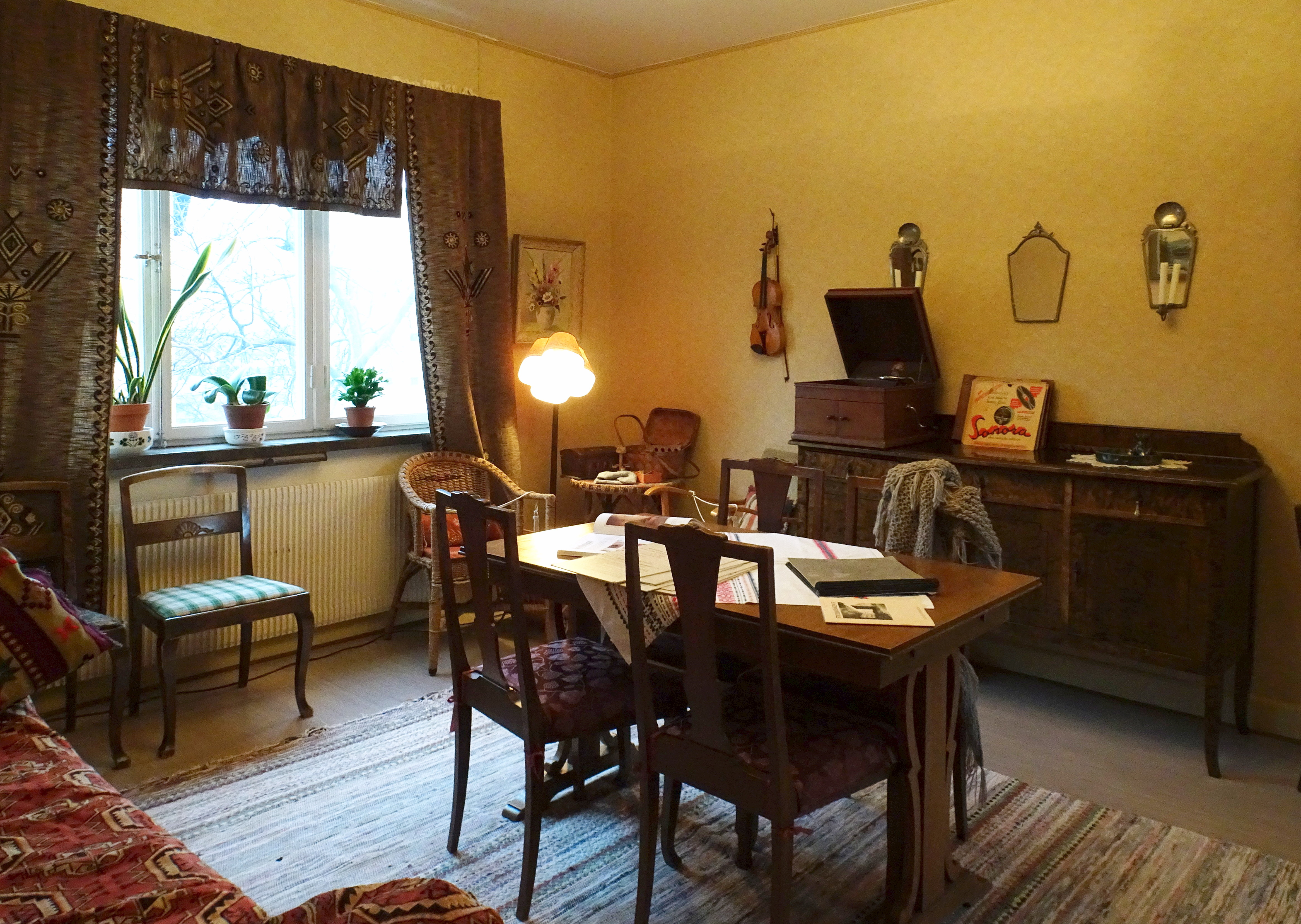 Stickelbärsvägen 7, vardagsrum